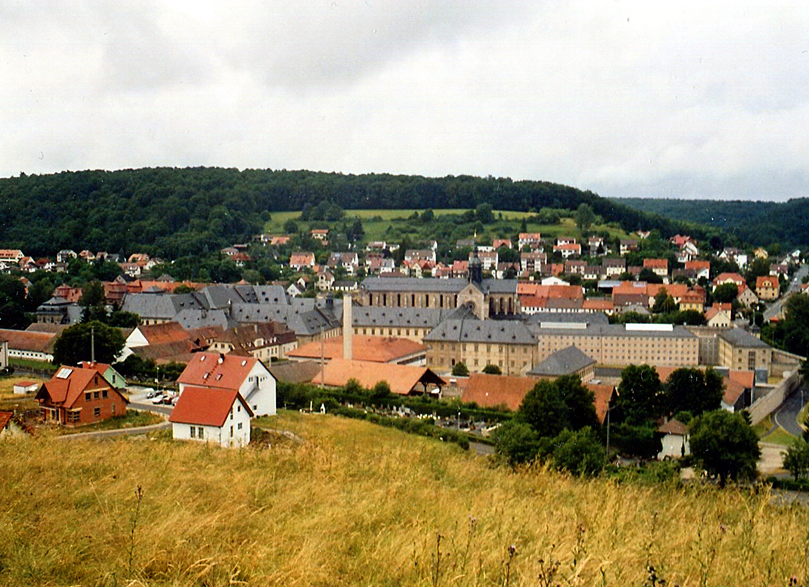 Клостер Эбрах.Общий вид